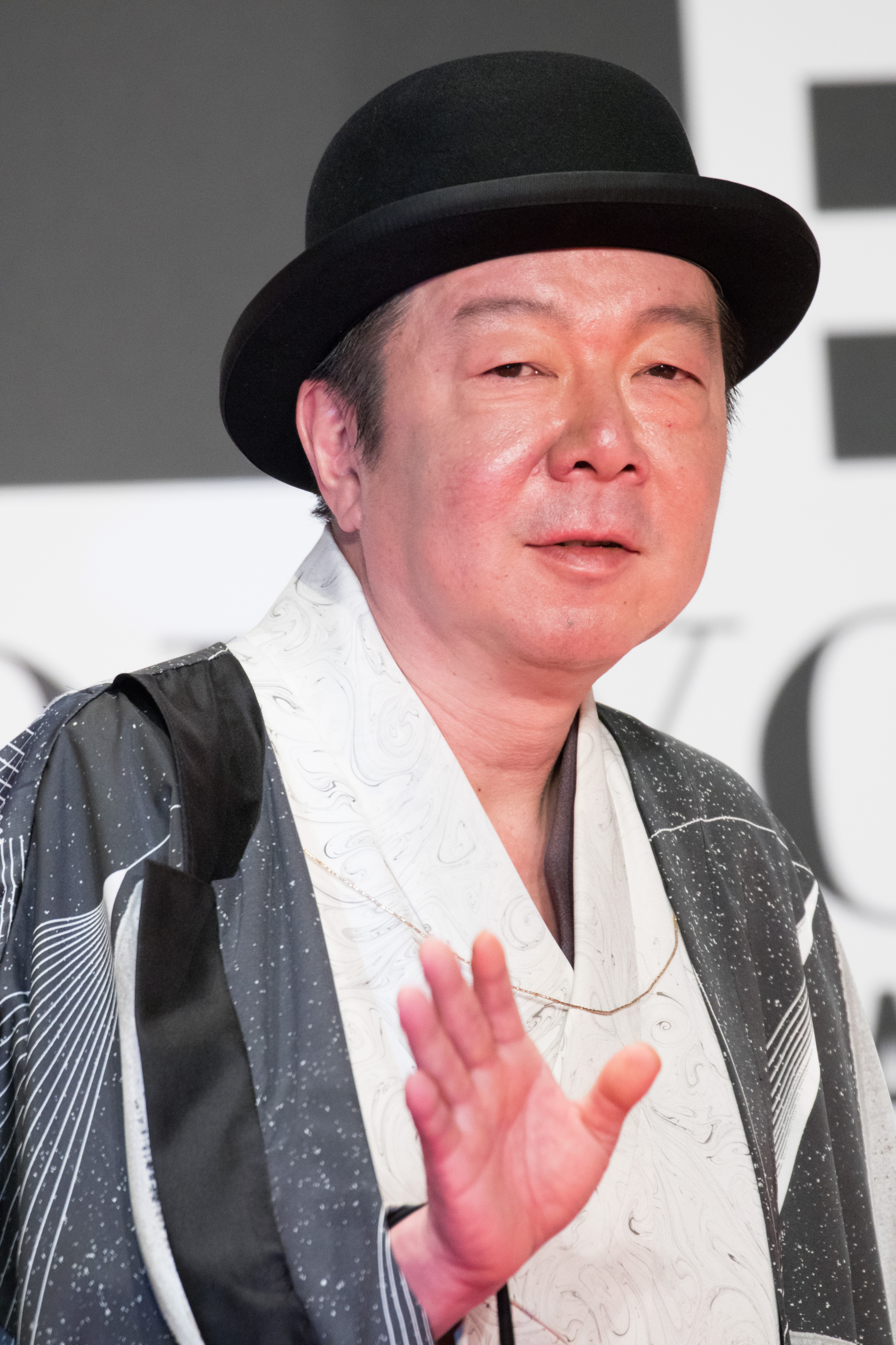 第29回 東京国際映画祭 オープニングセレモニー 古田新太 (乱鶯)